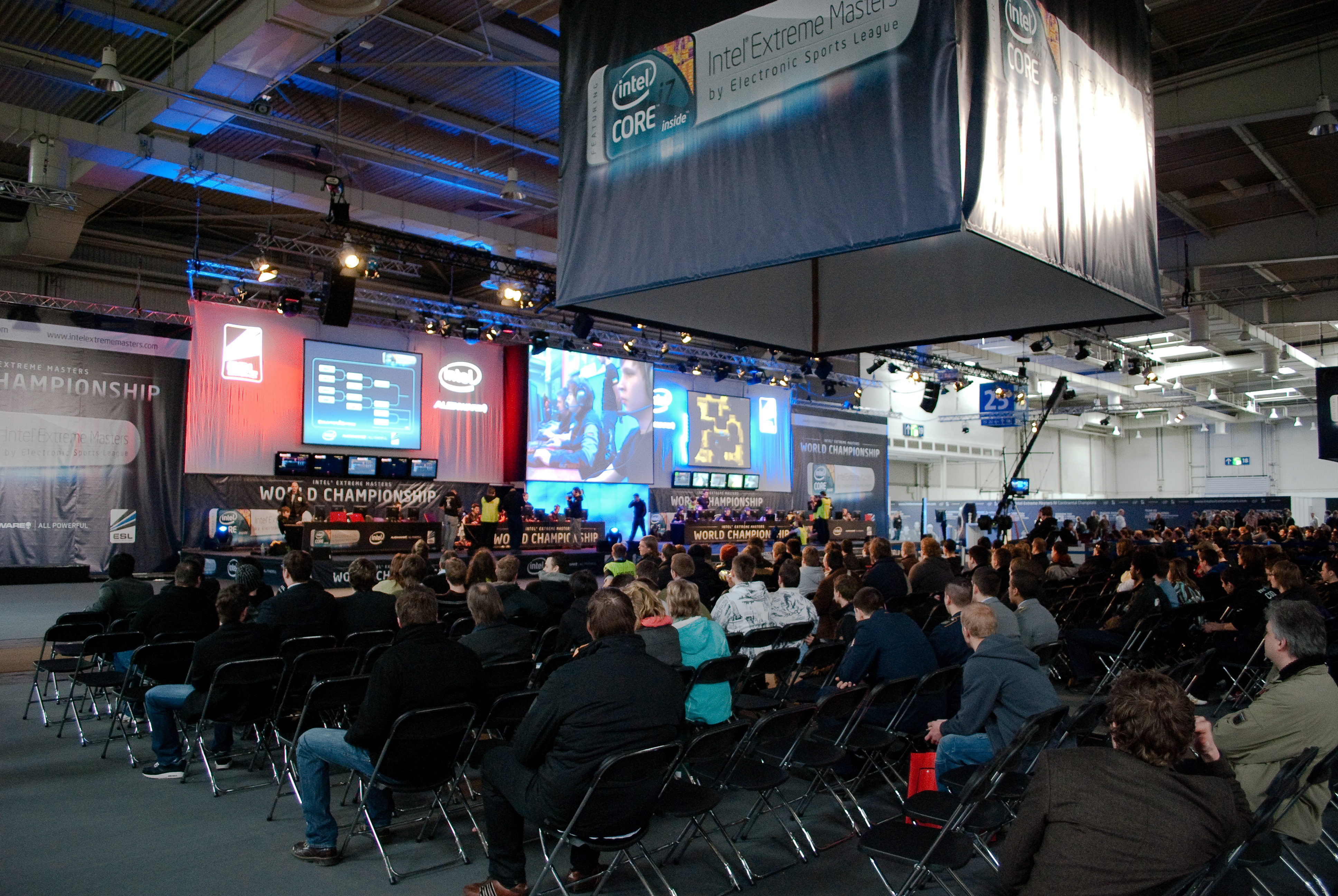 Intel Extreme Masters @CeBIT